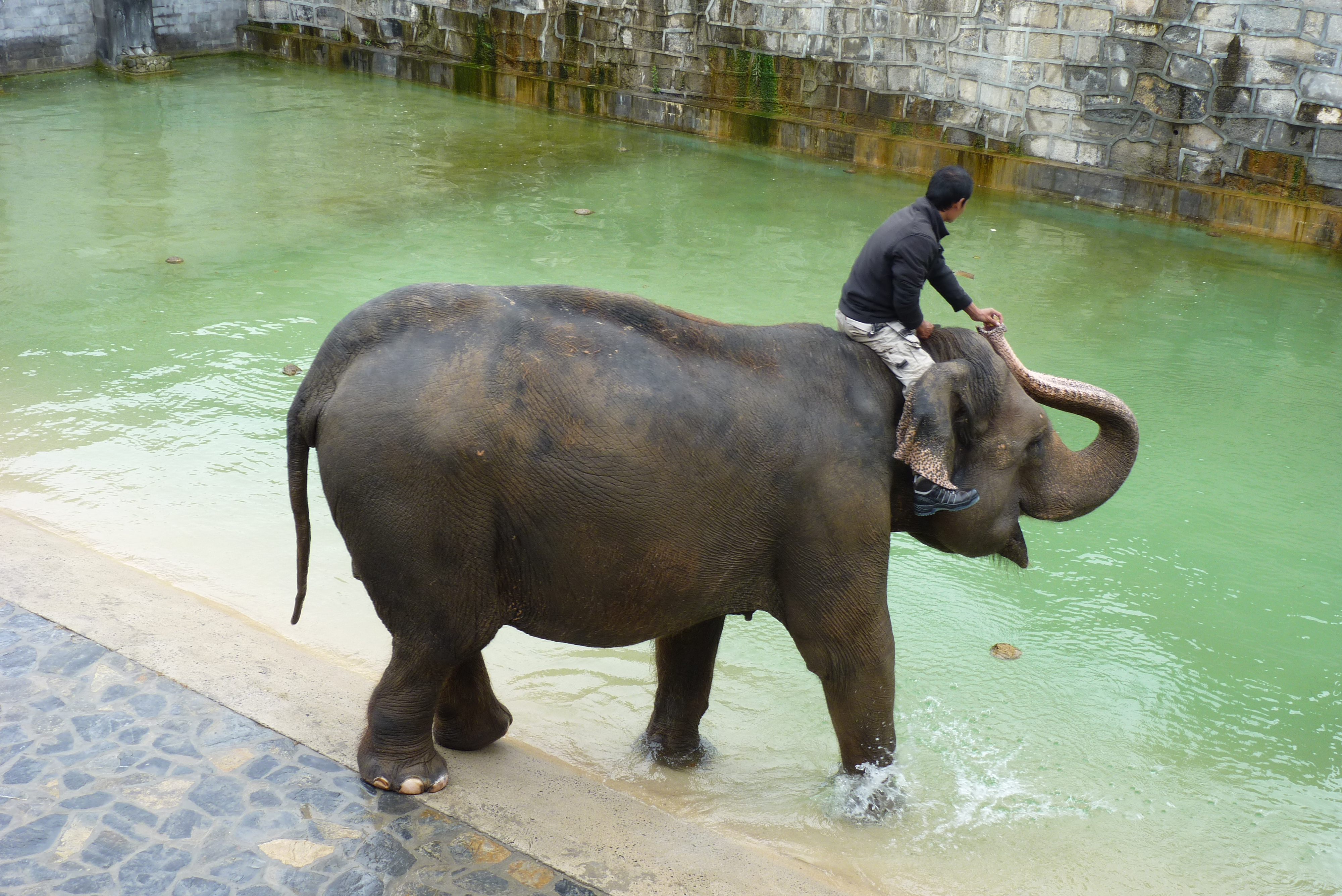 Пайри Дайза 2015, купание слонов в бассейне